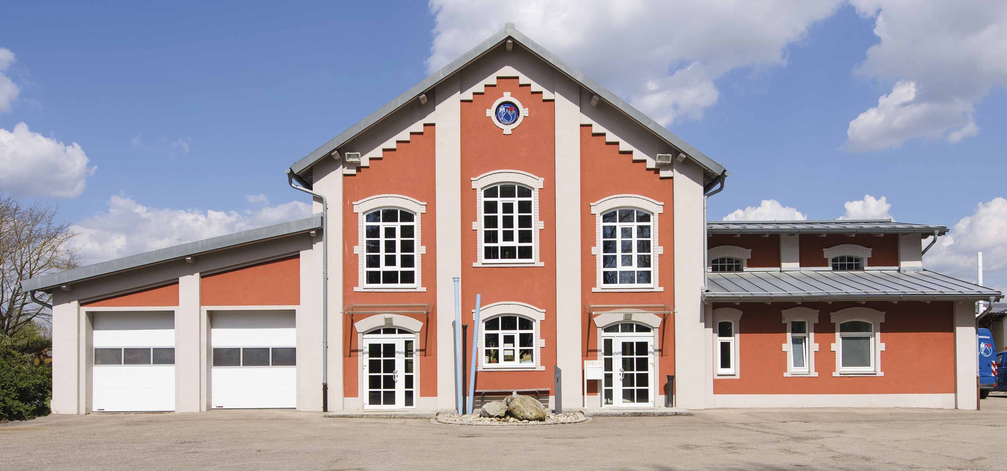 Schwabmünchen, Wasserwerk, Holzheystr. 73 (2007). In diesem Gebäude befand sich von 1907 bis 1964 das Gaswerk.